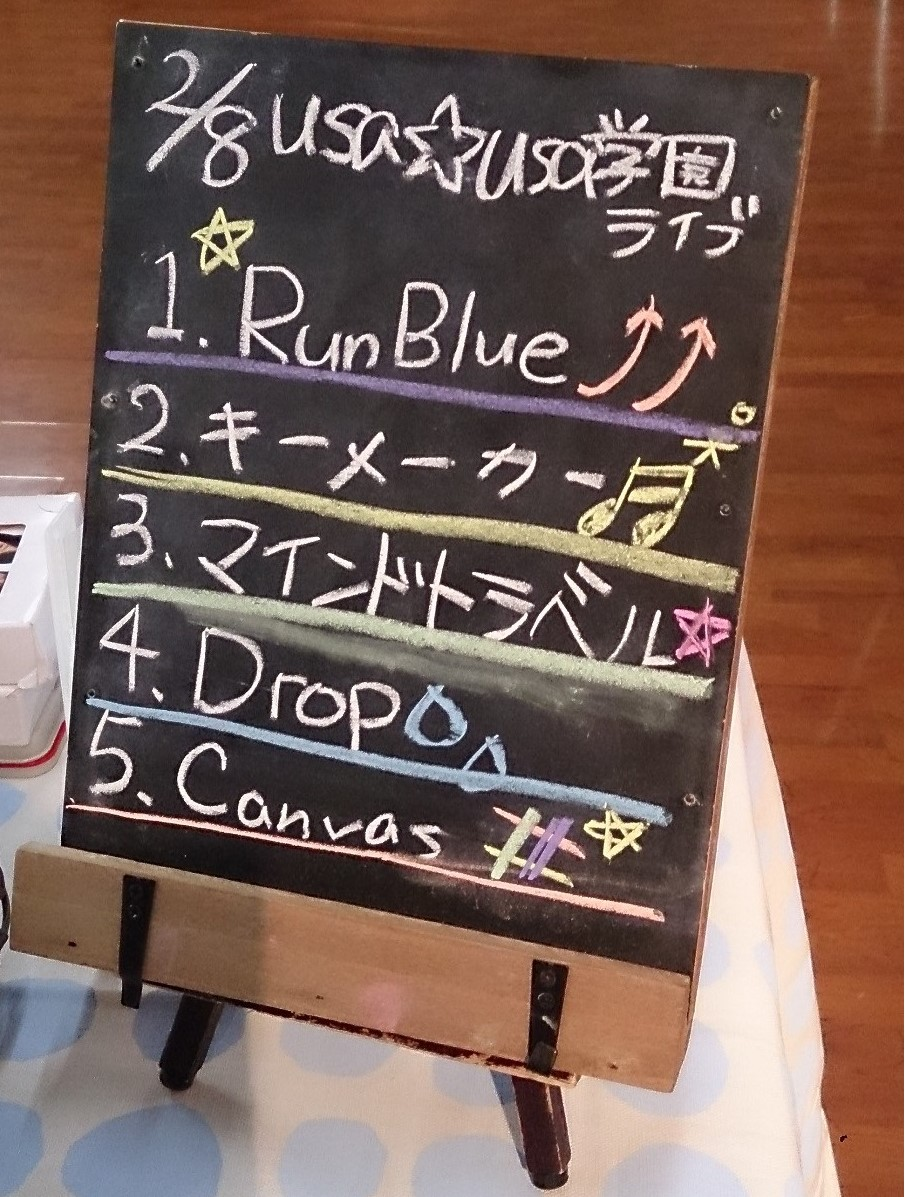 amiinaセトリボード(20150208(1))